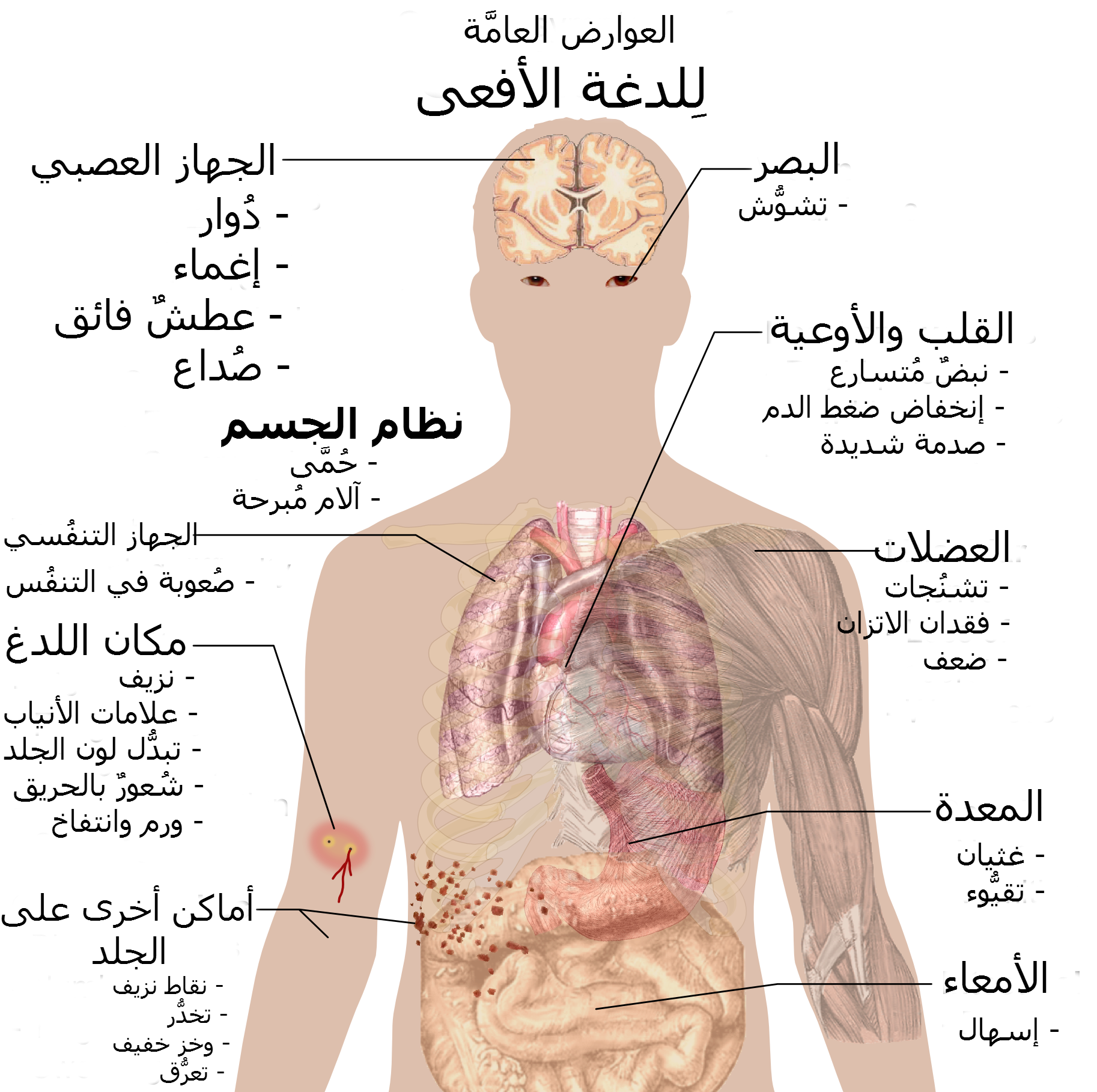 .رسمٌ بيانيٌّ يُوضح أكثر عوارض لسعات الأفاعي شُيوعًا